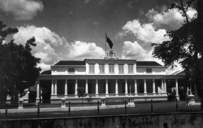 Foto. Het paleis van de Gouverneur Generaal in Noordwijk te Batavia